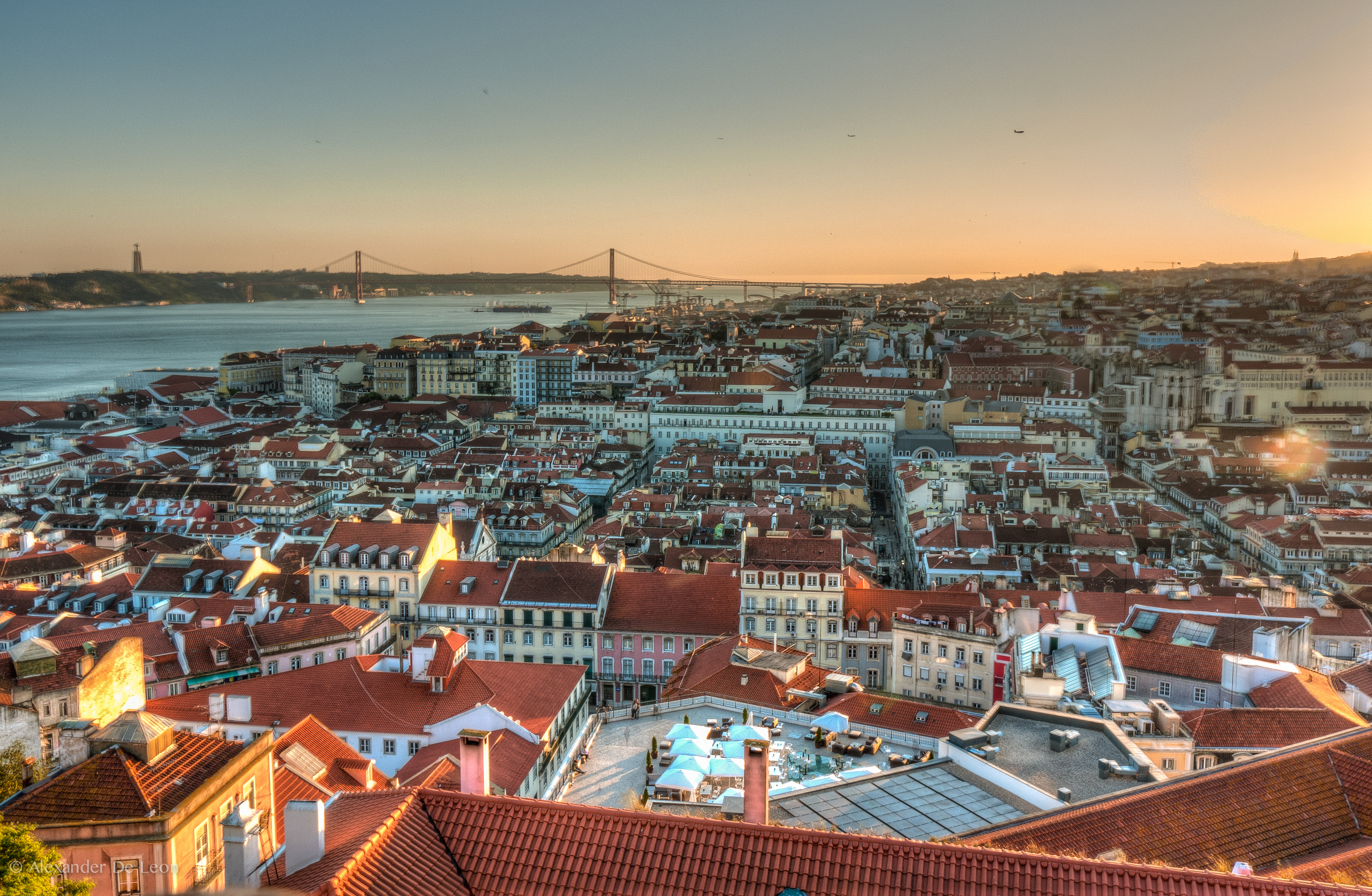 Panorâmica da cidade de Lisboa, Portugal.